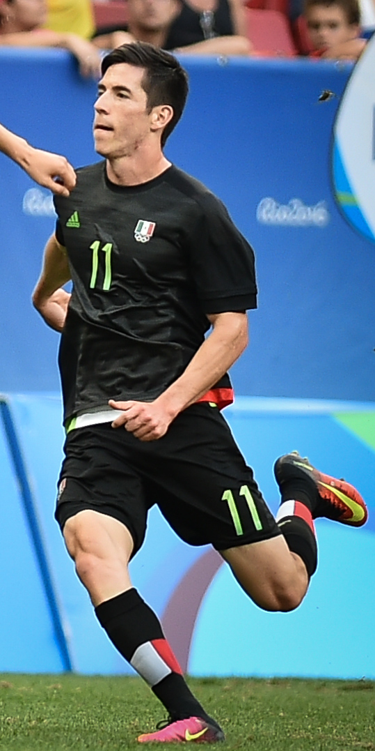 Estádio Nacional de Brasília Mané Garrincha, Brasília, DF, Brasil, 10/8/2016 Foto: Andre Borges/Agência Brasília. O time da Coréia do Sul classificou-se para a próxima fase do torneio de futebol masculino da Olimpíada com uma vitória por 1 a 0 contra o México. Kwon Chang-hoon marcou o gol da vitória sul-coreana aos 32 minutos do segundo tempo.